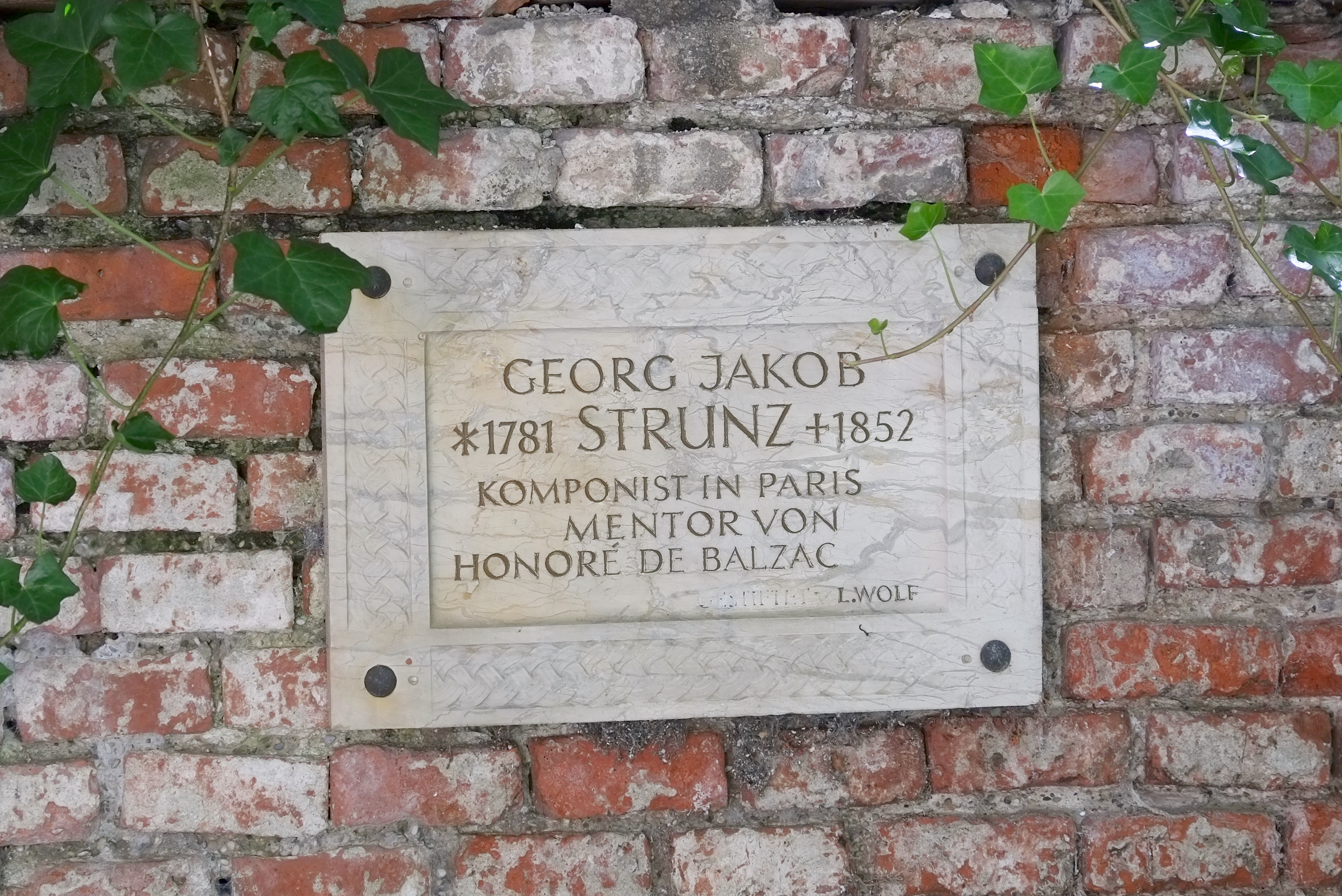 Gedenktafel für Georg Jakob Strunz auf dem Alten Südfriedhof in München (Bayern, Deutschland)